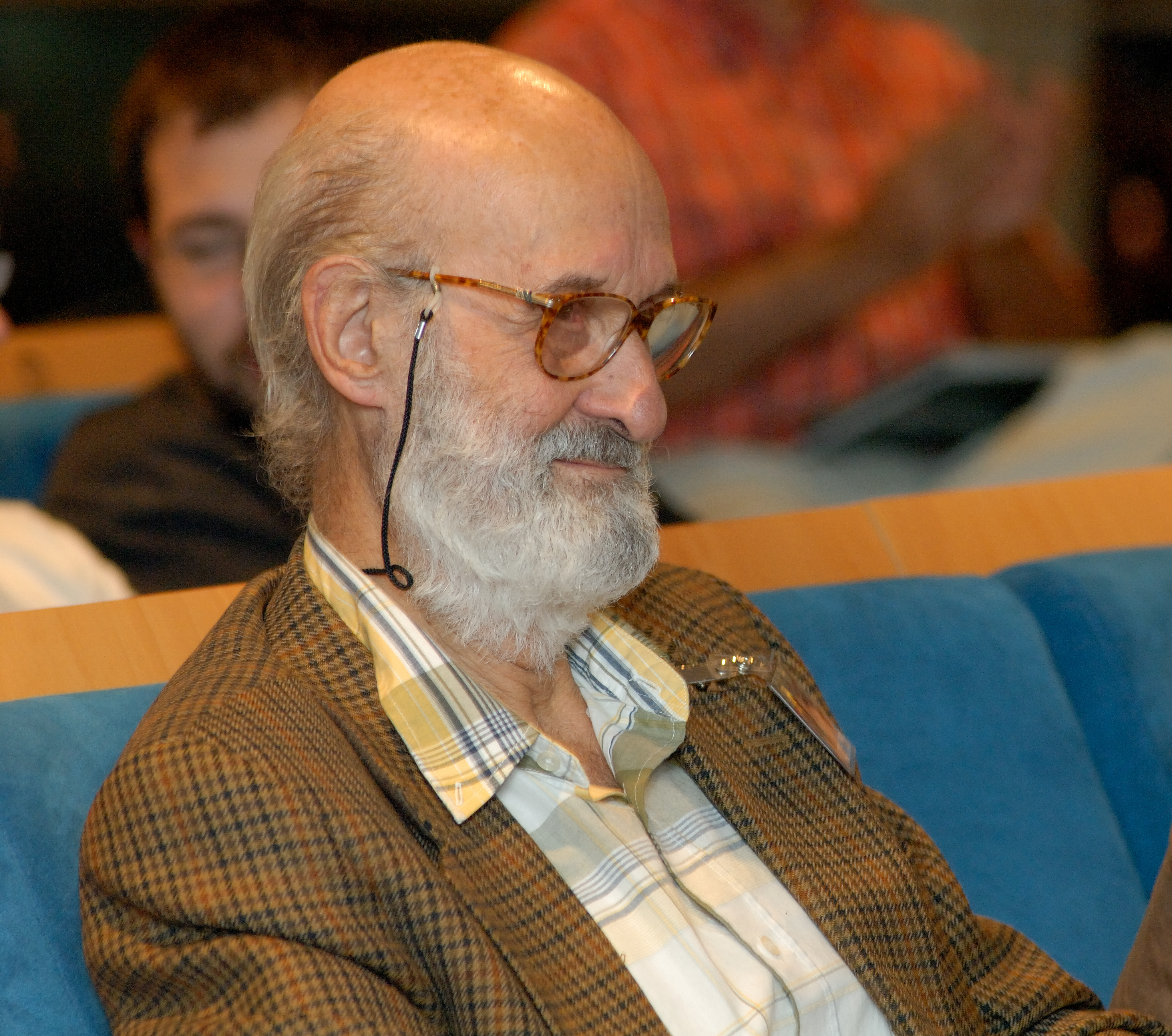 Francesc Vicens al MHC el 2006.